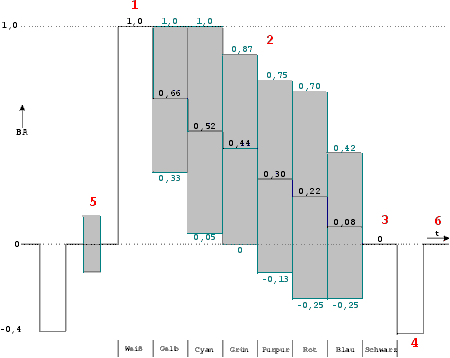 Waveform-Darstellung eines 100/75-Farbbalkens (Fernsehen)